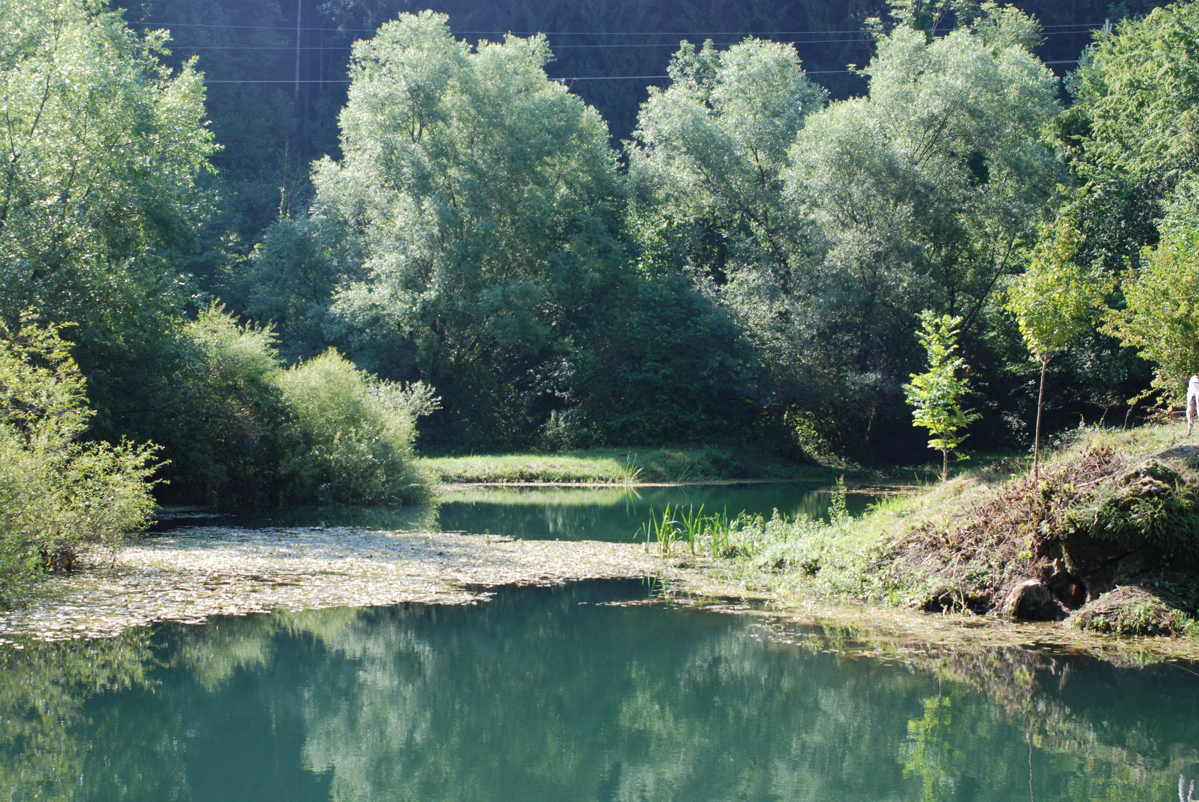 Sinjac snimljen tijekom ekspedicije "Kamena galaksija - Zrmanja 2016"